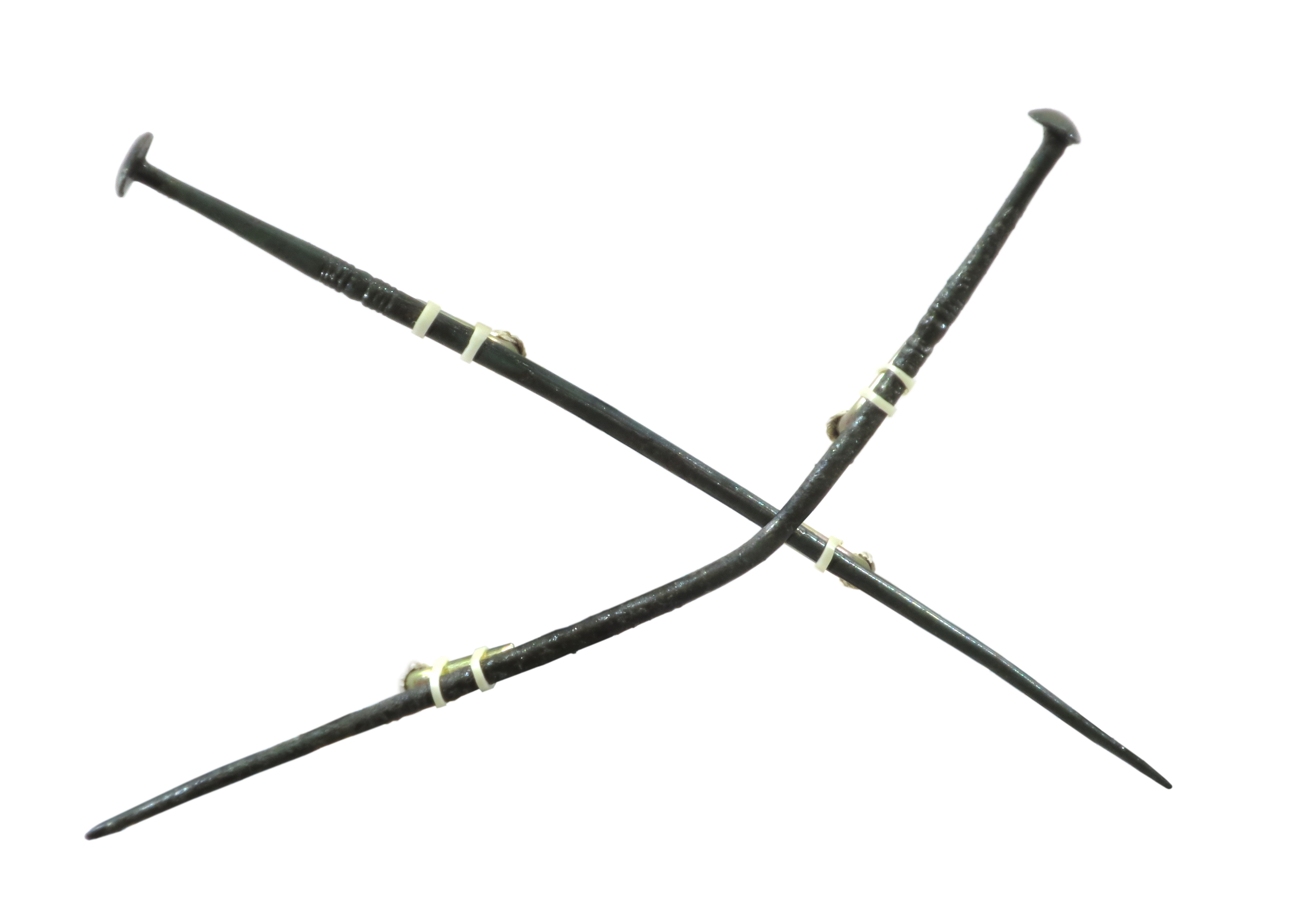 Знахідки з Хотівського городища скіфської доби в Археологічному музеї (Київ). Дві бронзові цвяхоподібні шпильки з рівня давньої денної поверхні в'їзду на західному мисі городища. Розкопки Е. А. Кравченко, 2016 р. Довжина близько 15 см. Суміщення окремих знімків.